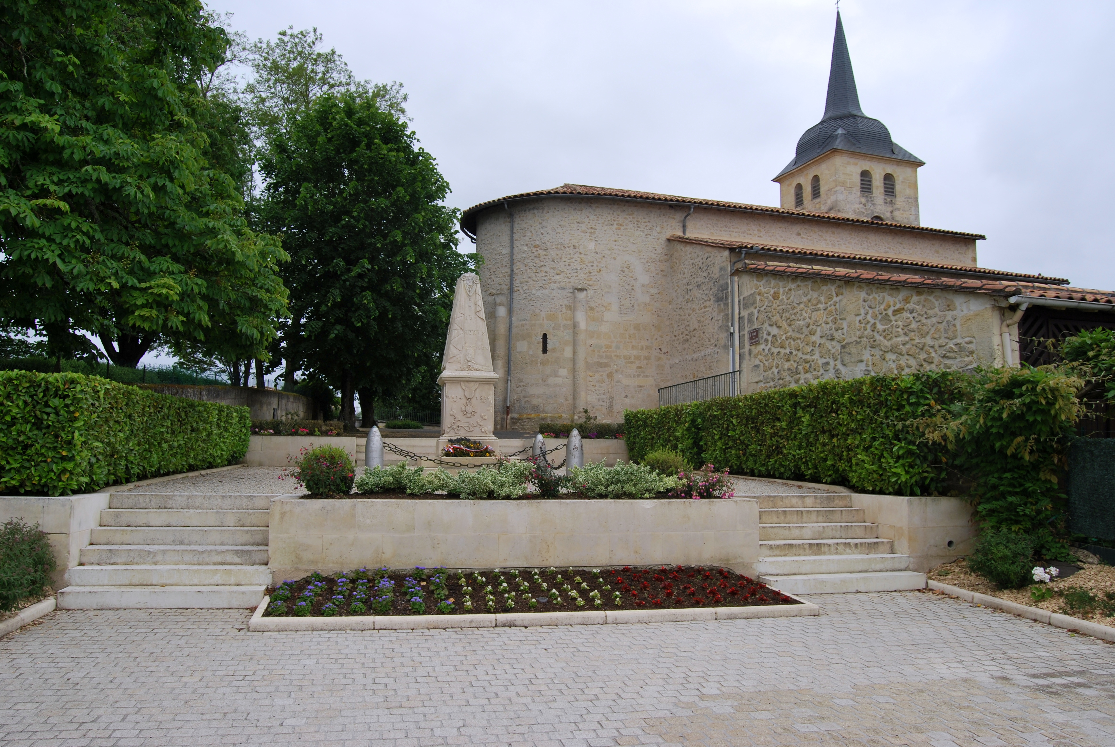 Yvrac Mont aux mort